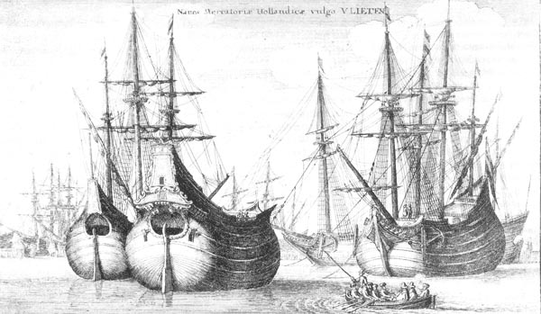 Wenzel Hollar: Holländische Handelsschiffe auf Reede; Stich, 17. Jhd.